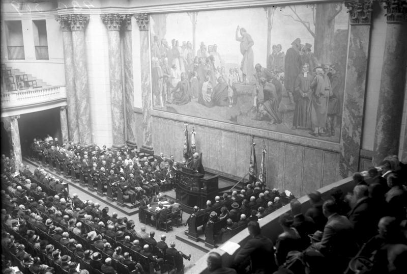 Der deutsche Kolonial-Gedenktag fand am 24. April in der Aula der Universität Berlin statt. Der Festakt in der Aula der Universität. Der Rektor der Universität hält die Gedenkrede.